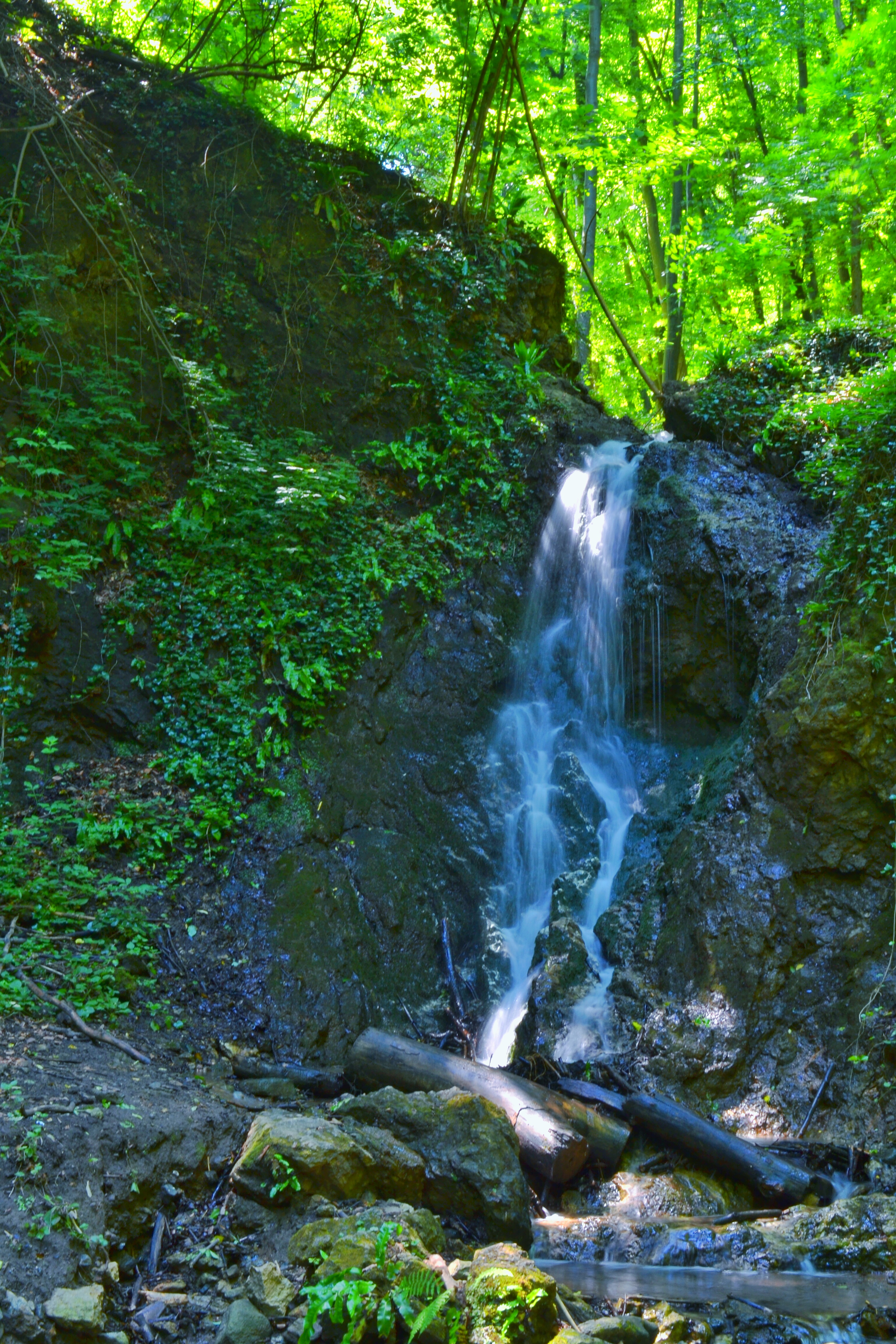 Ово је фотографија заштићеног природног добра у Србији под шифром: НП01 This is a a photo of a natural area in Serbia with ID: НП01 Jedan od nekoliko vodopada na Fruskoj Gori